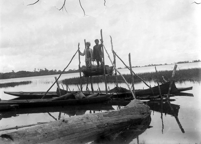 Negatief. Sagobereiding te Pulau Gawaq aan het Djempang meer in Koetai, Oost-Borneo